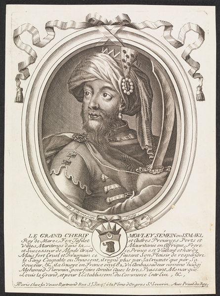 Le Grand Cherif Mouley Sémein ou Ismael